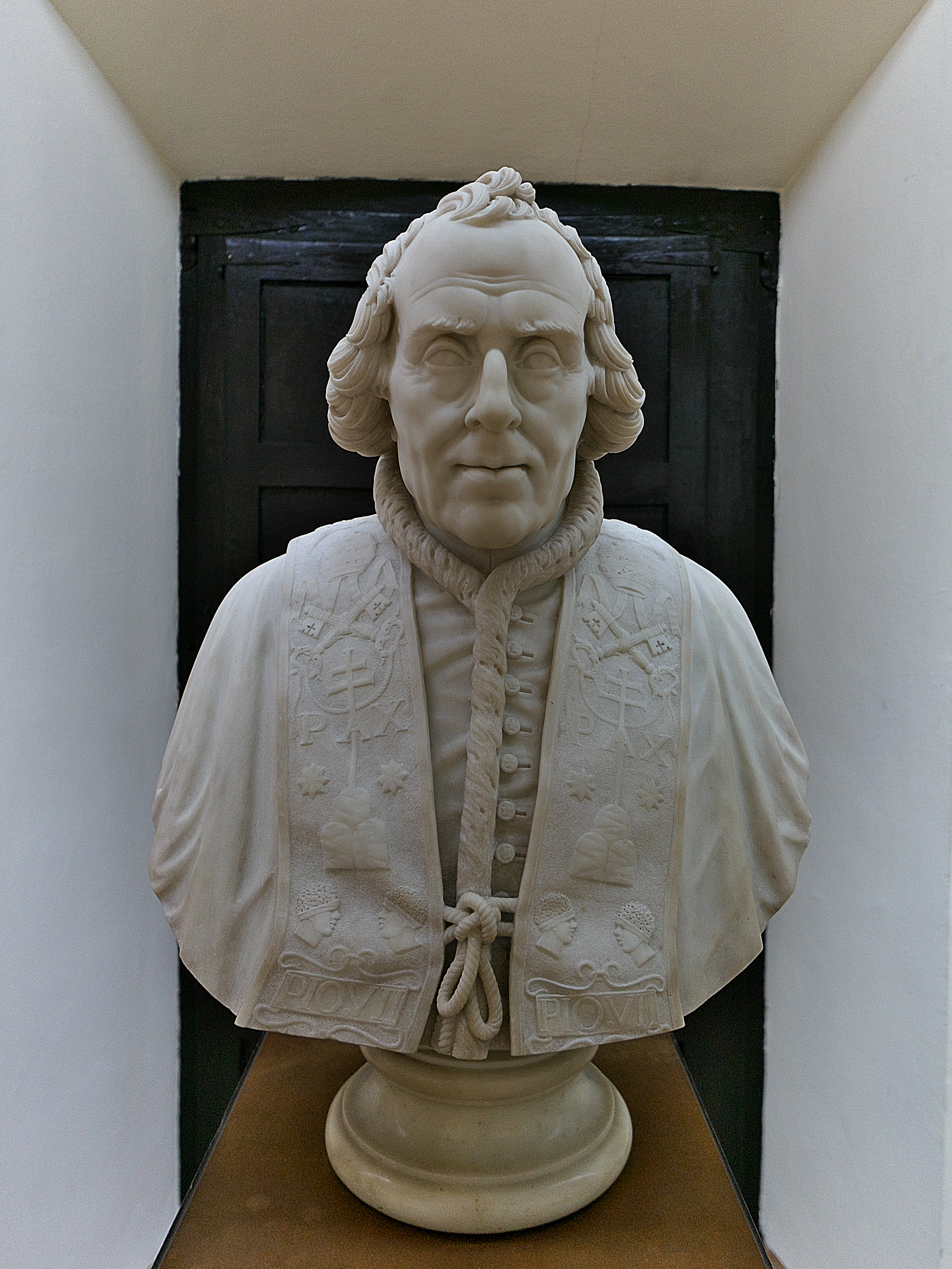 Museo de Bellas Artes de Asturias. Busto de Pío VII en mármol.